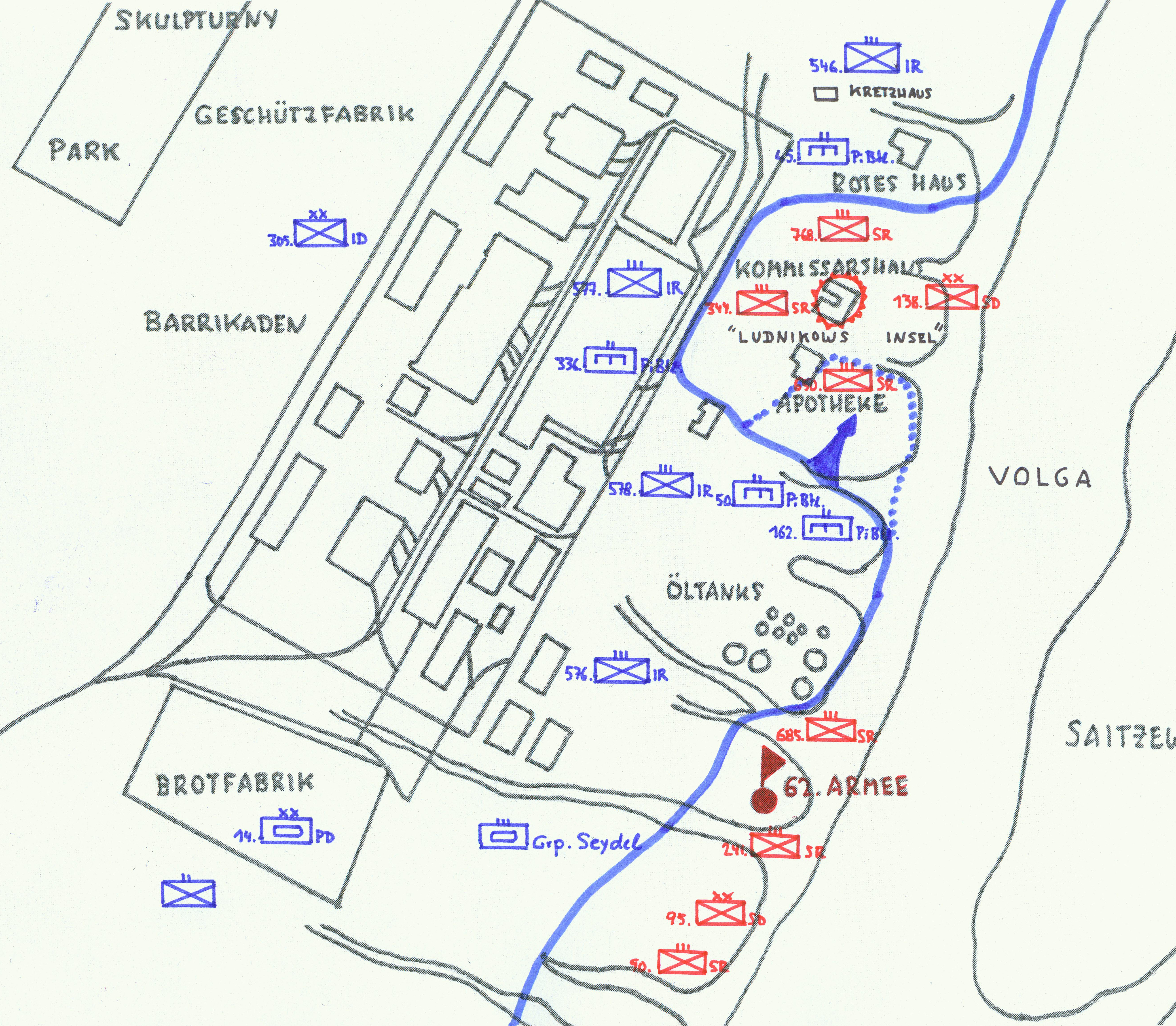 Ludnikov`s Island